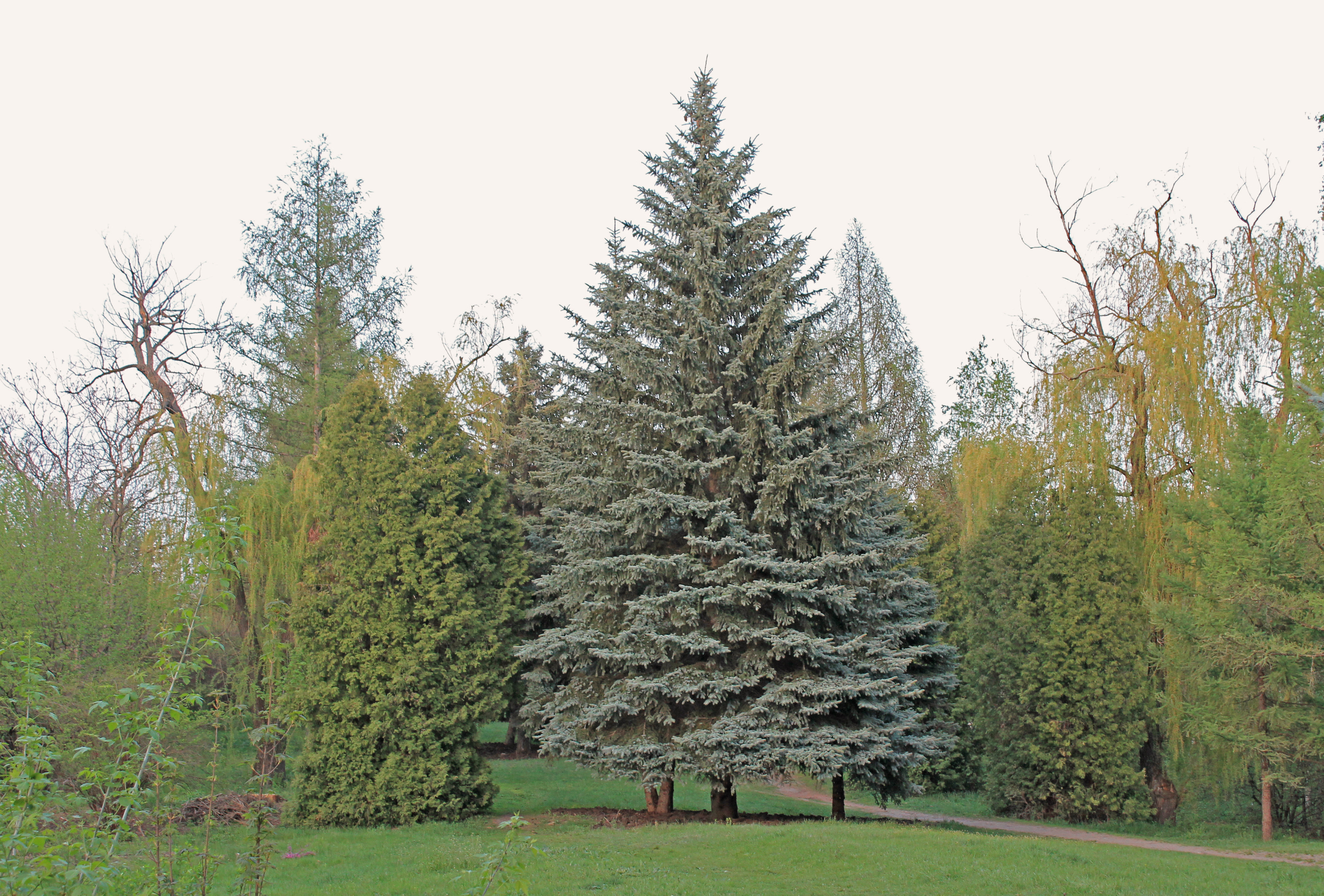 Дендрологічний парк Харківського національного аграрного університету ім. В. В. Докучаєва, с. Рогань, Харківський район, Харківська обл.